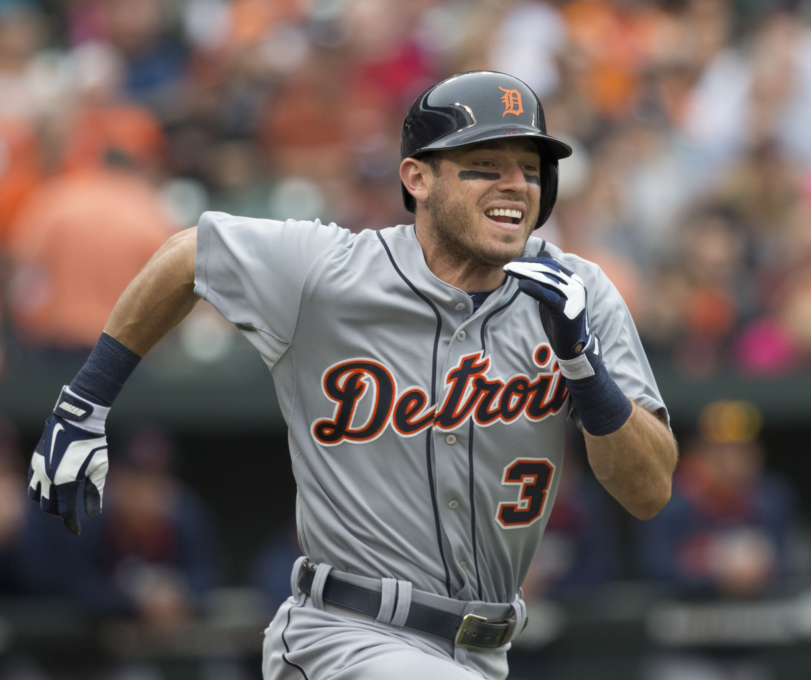 Ian Kinsler